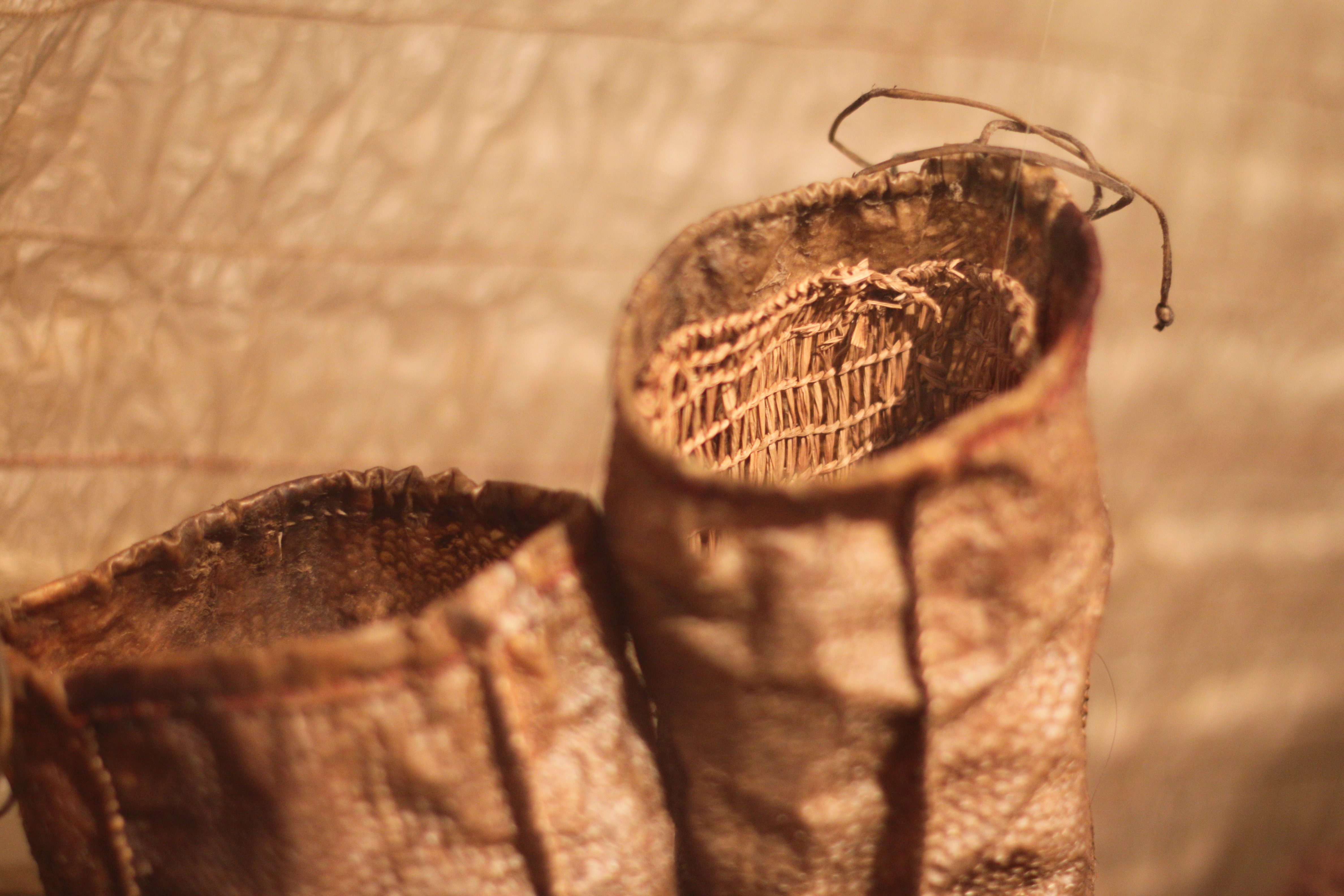 Kajakhandschuhe; aus Lachshaut; innen mit handschuhen aus Grasgeflecht; Alaska-Eskimo; Sammlung Jacobsen 1883